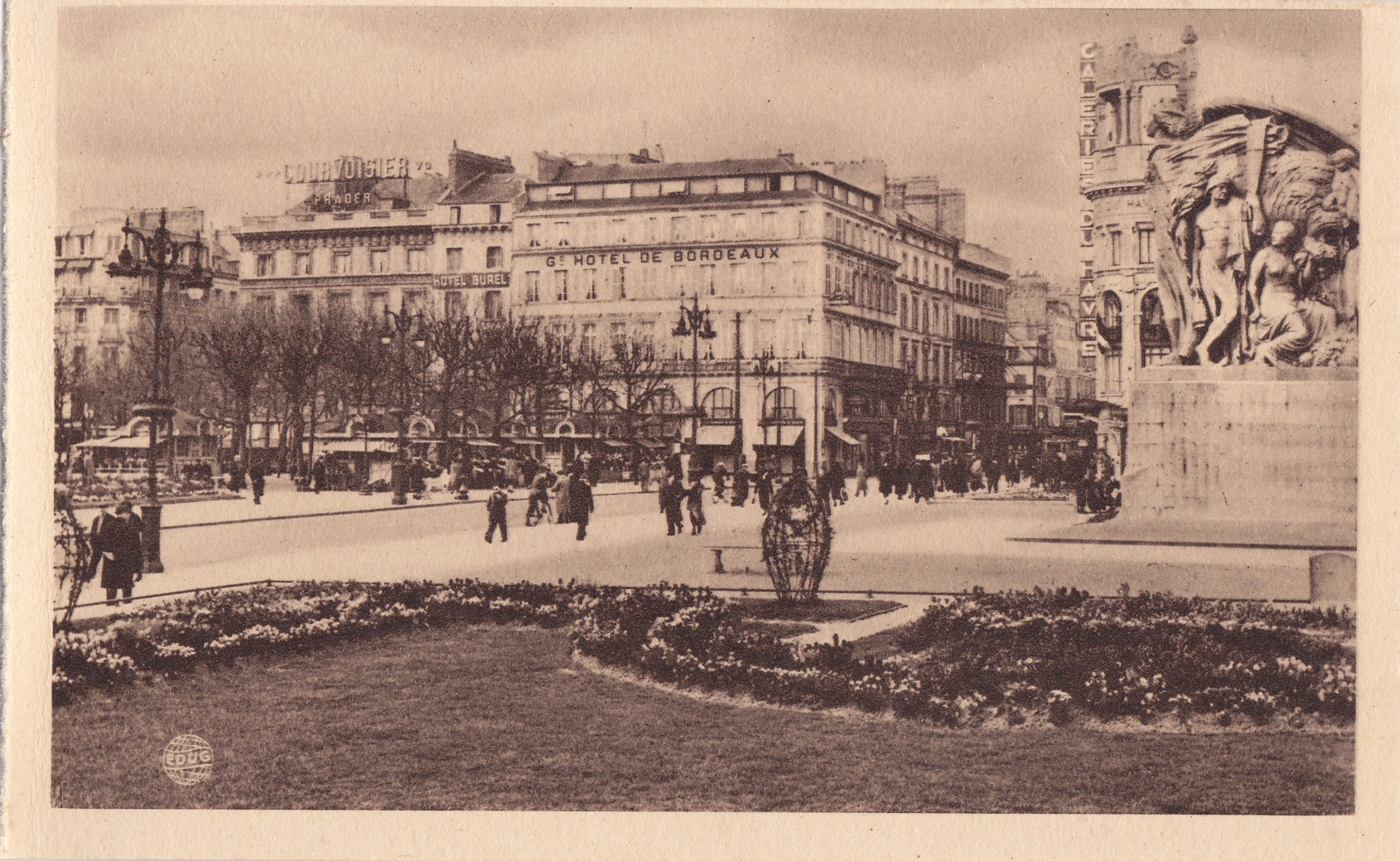 Le Havre, França, Place Gambetta - Monument aux Morts, princípio do séc. XX, França, Arquivo de Villa Maria, Angra do Heroísmo, Açores.